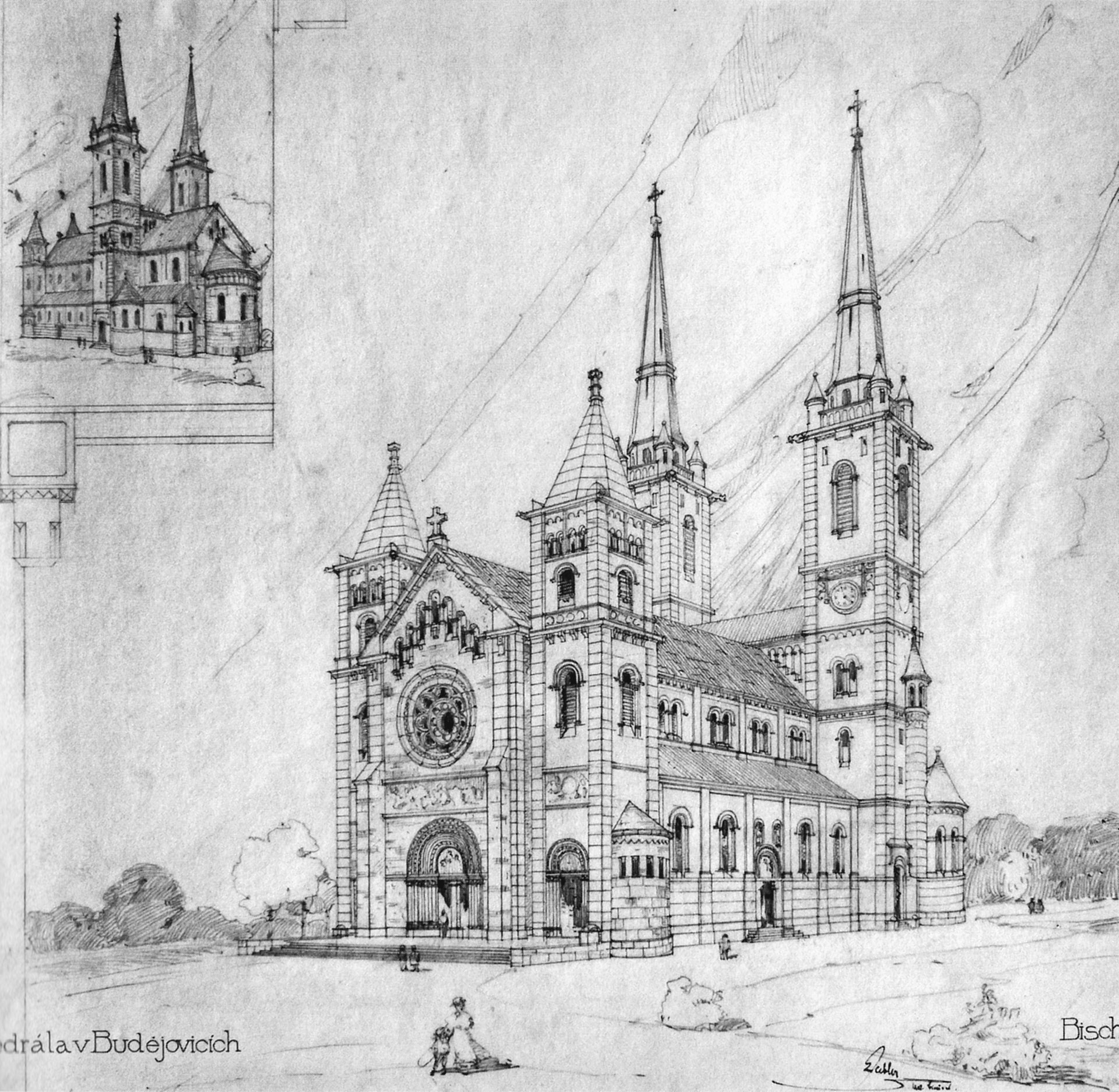 Návrh nové katedrály v pseudorománském slohu, autor Ludvík Lábler. Návrh byl umístěna na Senovážné náměstí v Českých Budějovicích.